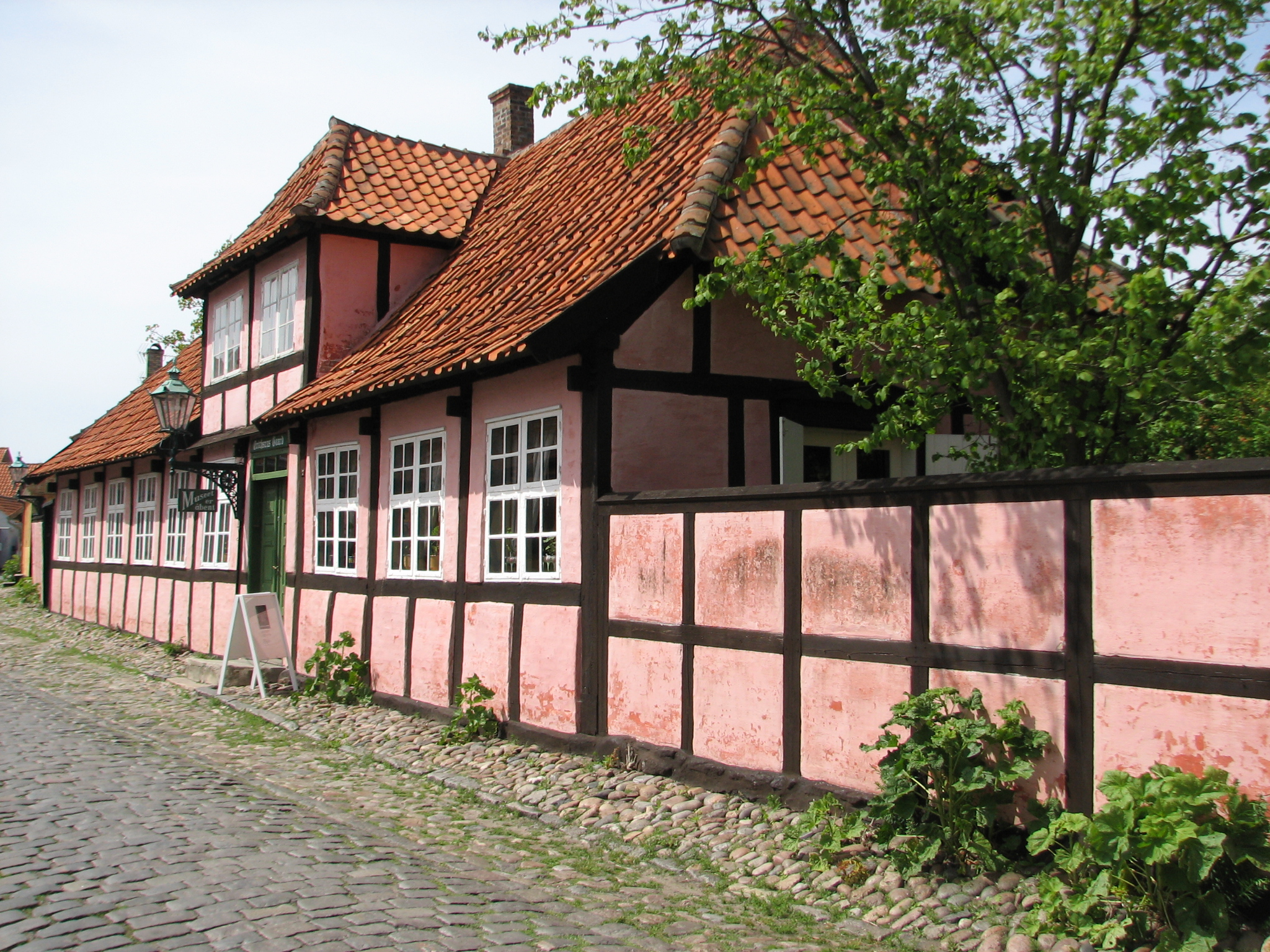 Erichsens Gård